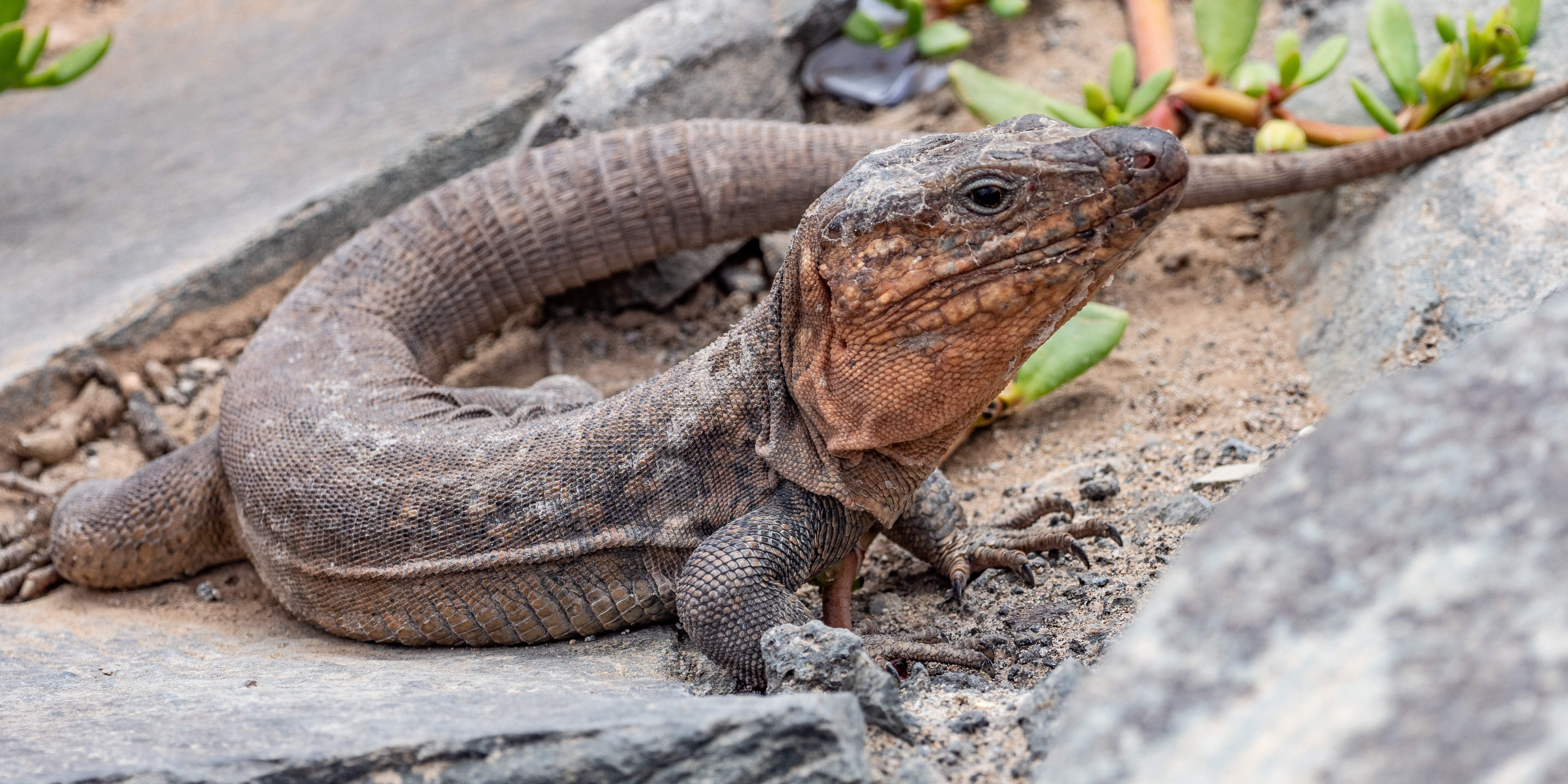 Maspalomas, Gran Canaria, April 2019